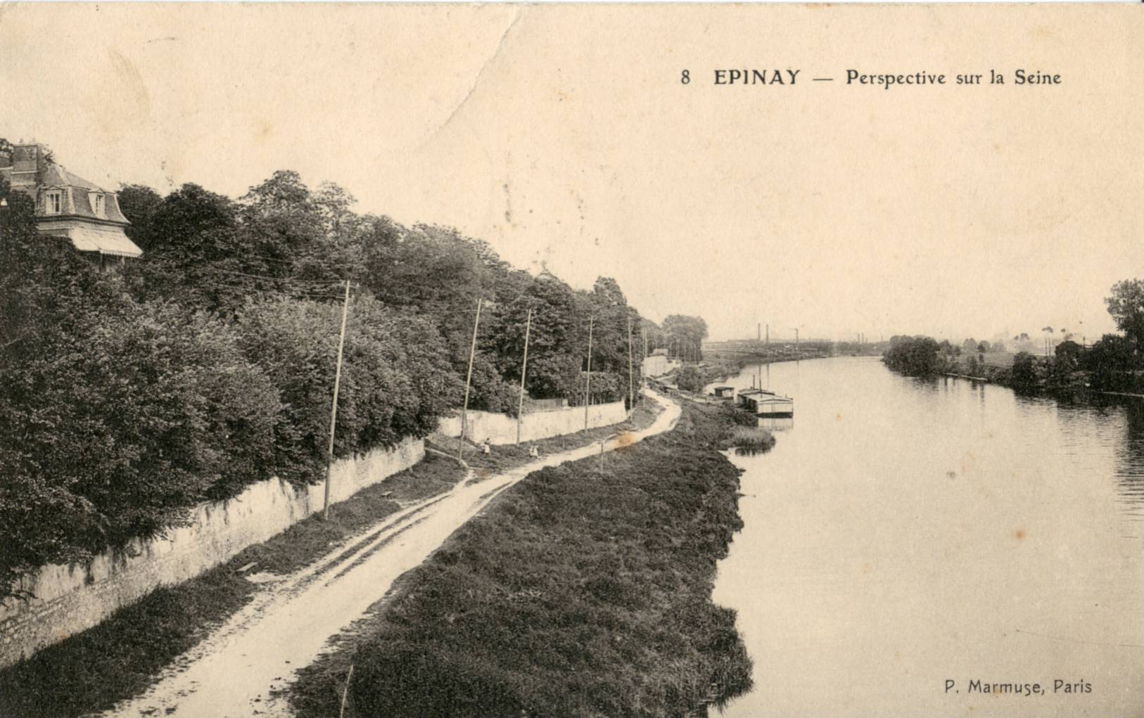 Carte postale ancienne édirée par P. Marmuse, N°8 ÉPINAY - Perspective sur la Seine